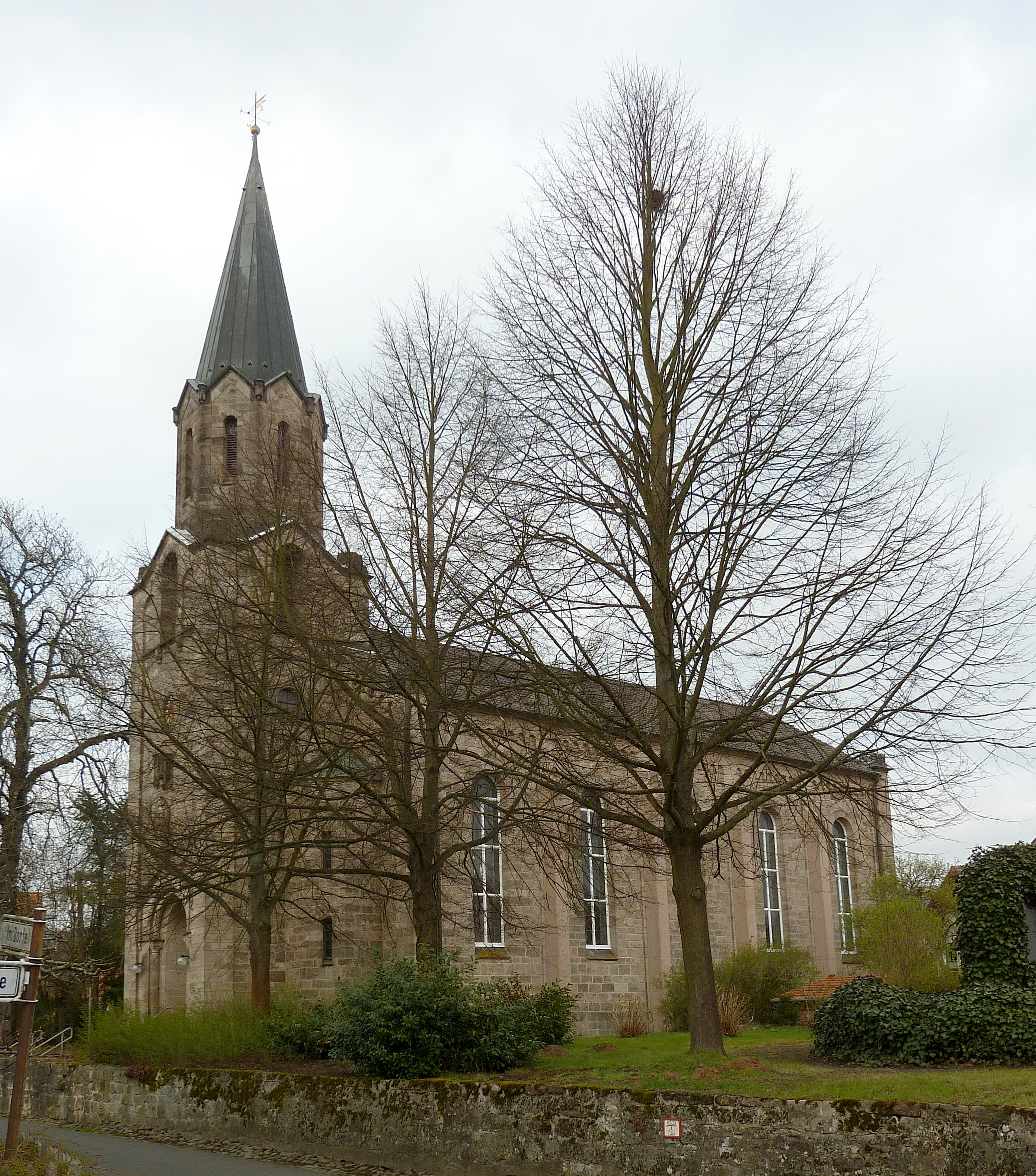 Ev.-luth. Kirche St. Petri in Wiershausen, Stadt Hann. Münden, Südniedersachsen